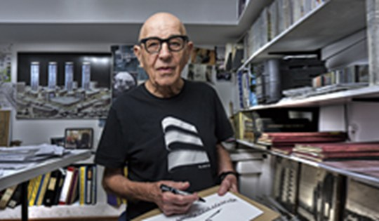 פרופסור לאדריכלות - יעקב יער